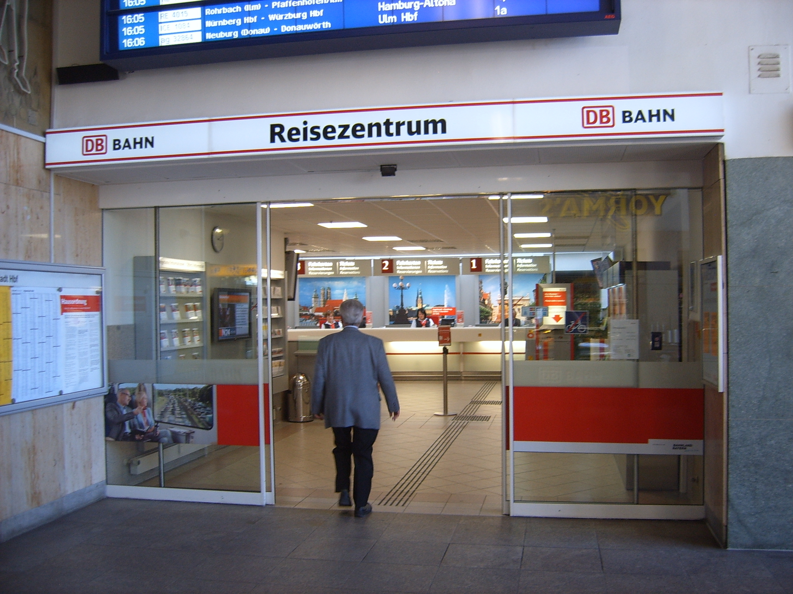 Das Foto zeigt den Eingang zum Reisezentrum des Ingolstädter Hauptbahnhofs.